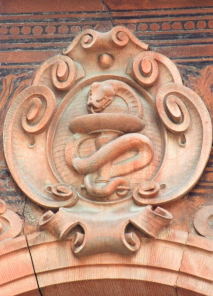 Fra Svaneapoteket i Lund.